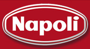 Logo der Firma Josef Manner & Comp. AG für das Produkt Napoli